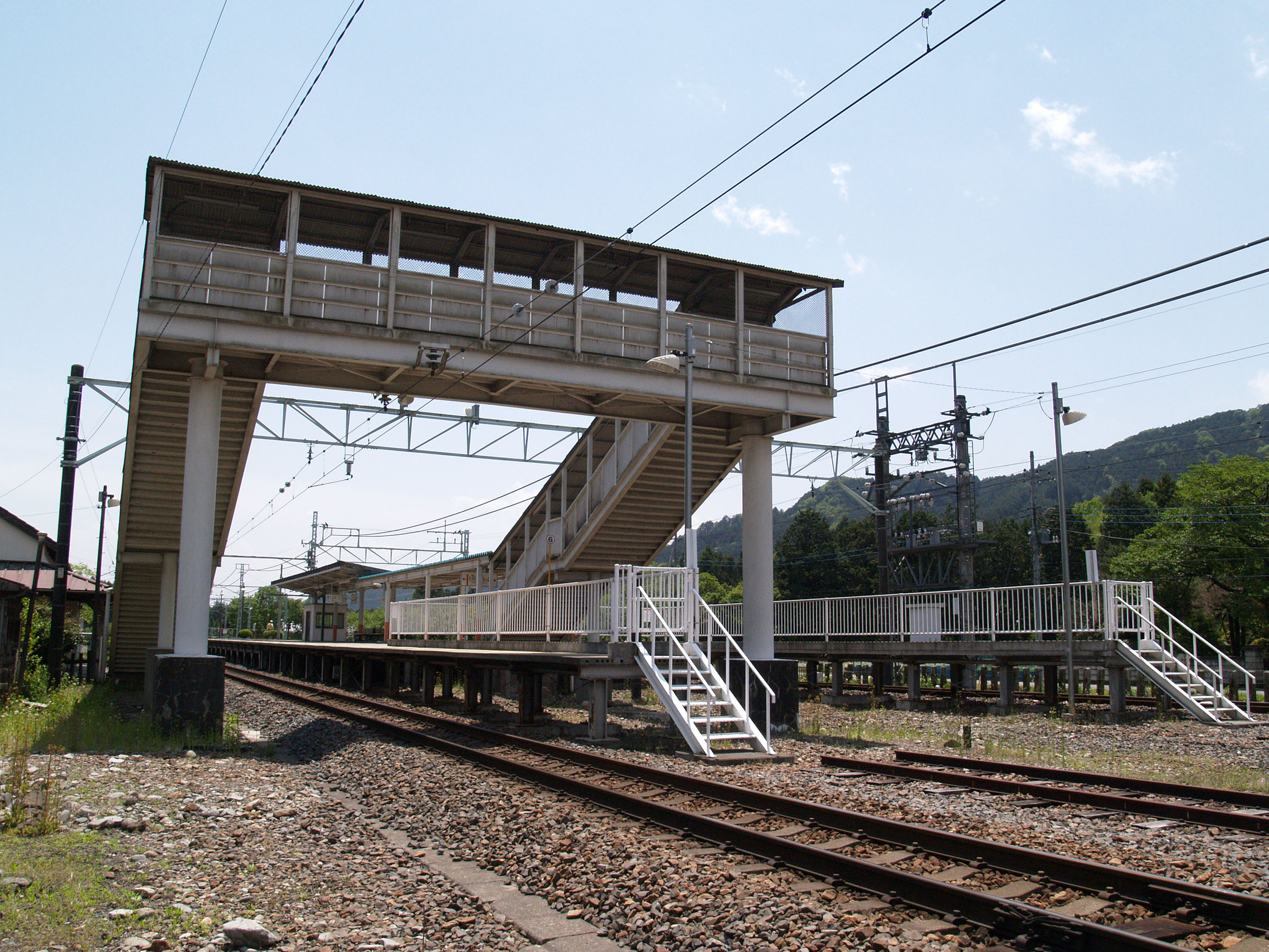 板荷駅ホーム